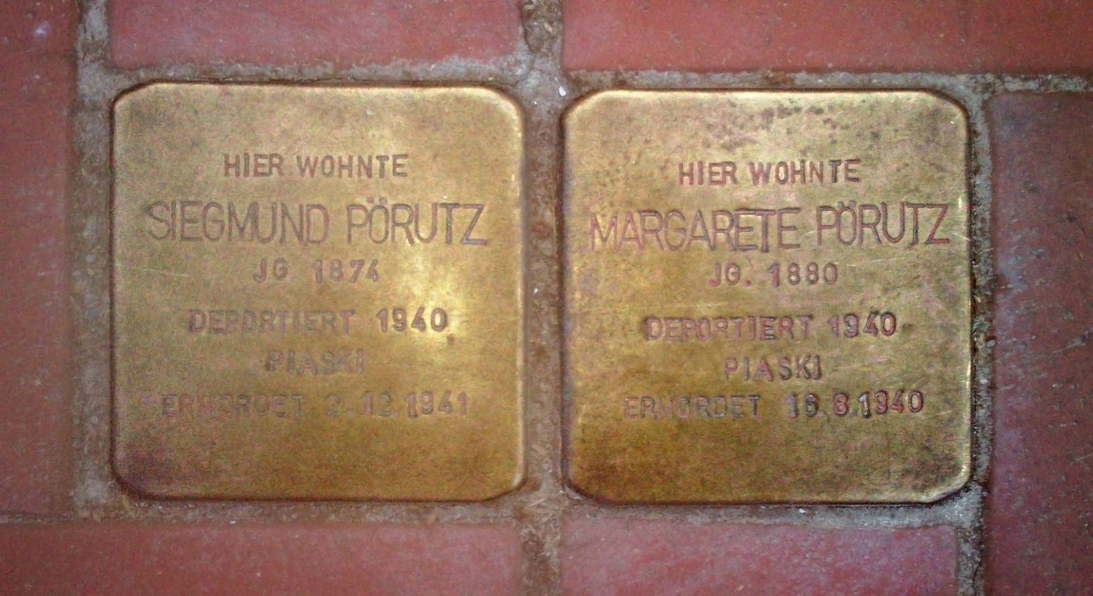 Heringsdorf, Usedom, Friedenstraße: 2 Stolpersteine für Siegmund und Margarete Pörutz.